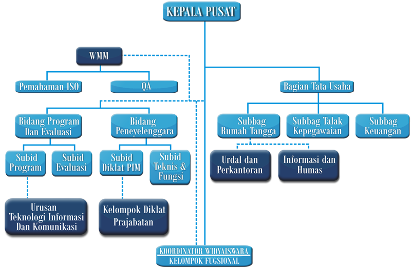 Struktur organisasi Pusdiklat Depdiknas